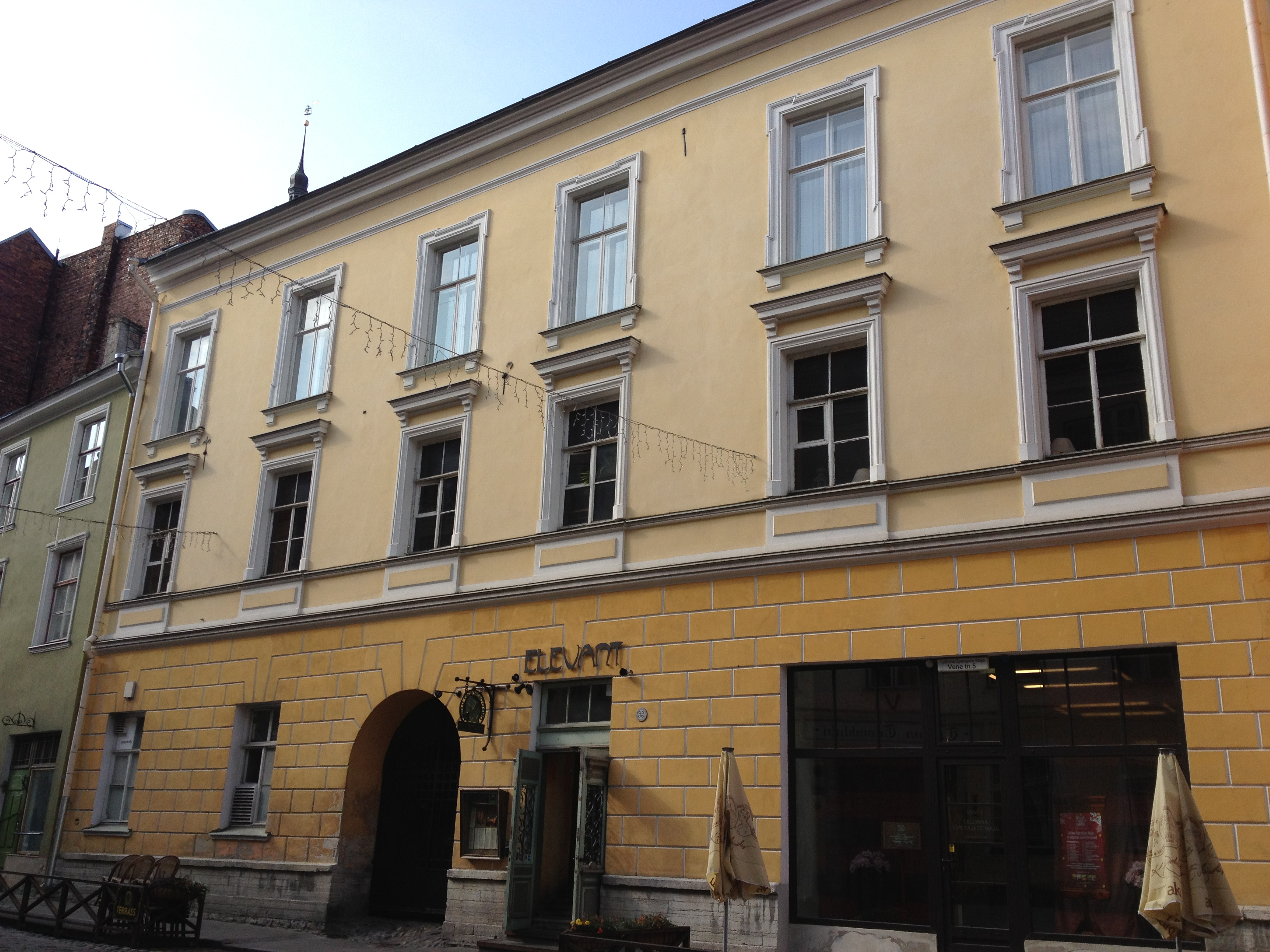 Vene tn 5 fassaadid 18.–19.saj.